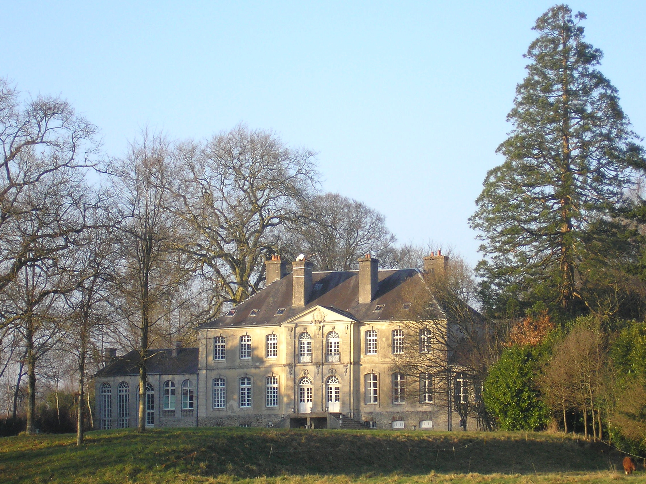 Carantilly (Normandie, France). Le château.